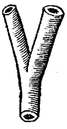 Primera ilustración de la pipa de tabaco, por el cronista Gonzalo Fernández de Oviedo (1535). “los caciques e hombres prinçipales tenian unos palillos huecos del tamaño de un xeme ó menos de la groseza del dedo menor de la mano, y estos cañutos tenian dos cañones respondientes á uno, como aquei está pintado, é todo en una pieza. Y los dos ponian en las ventanas de las nariçes é el otro en el humo é hierva que estaba ardiendo ó quemándose; y estaban muy lisos é bien labrados...”